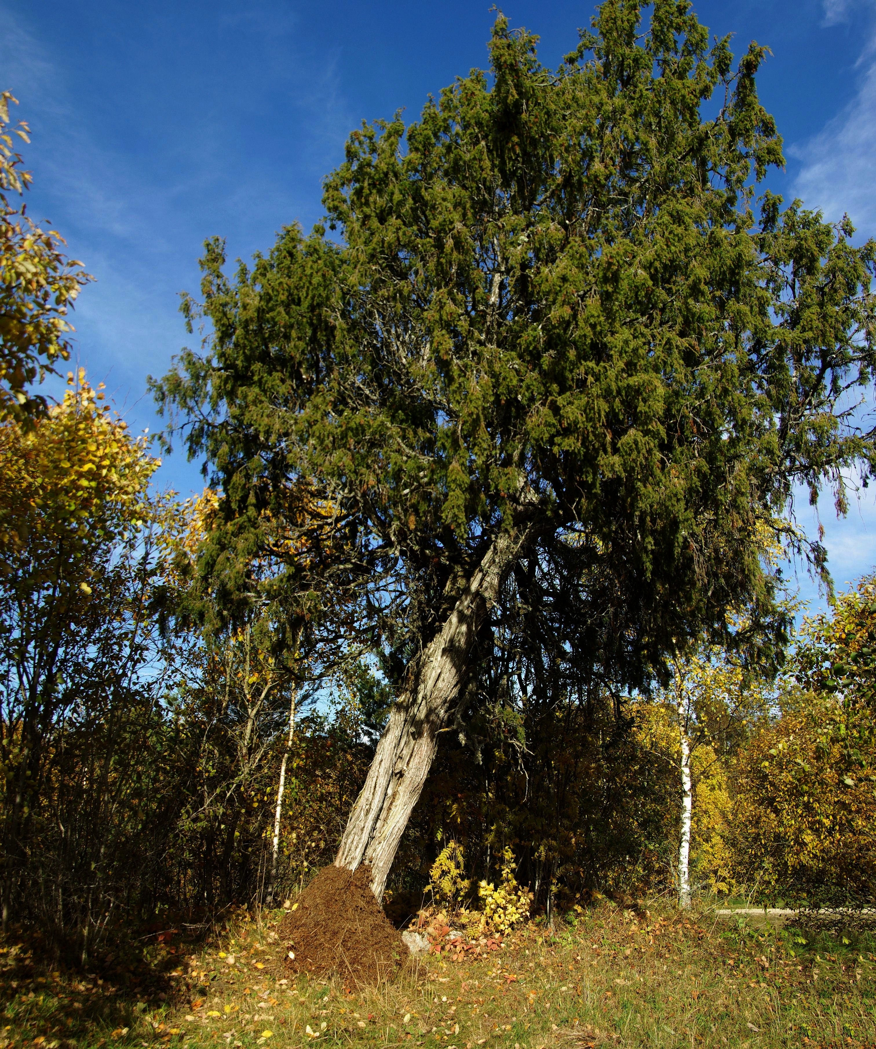 Harju maakond, Rae vald, Suursoo küla